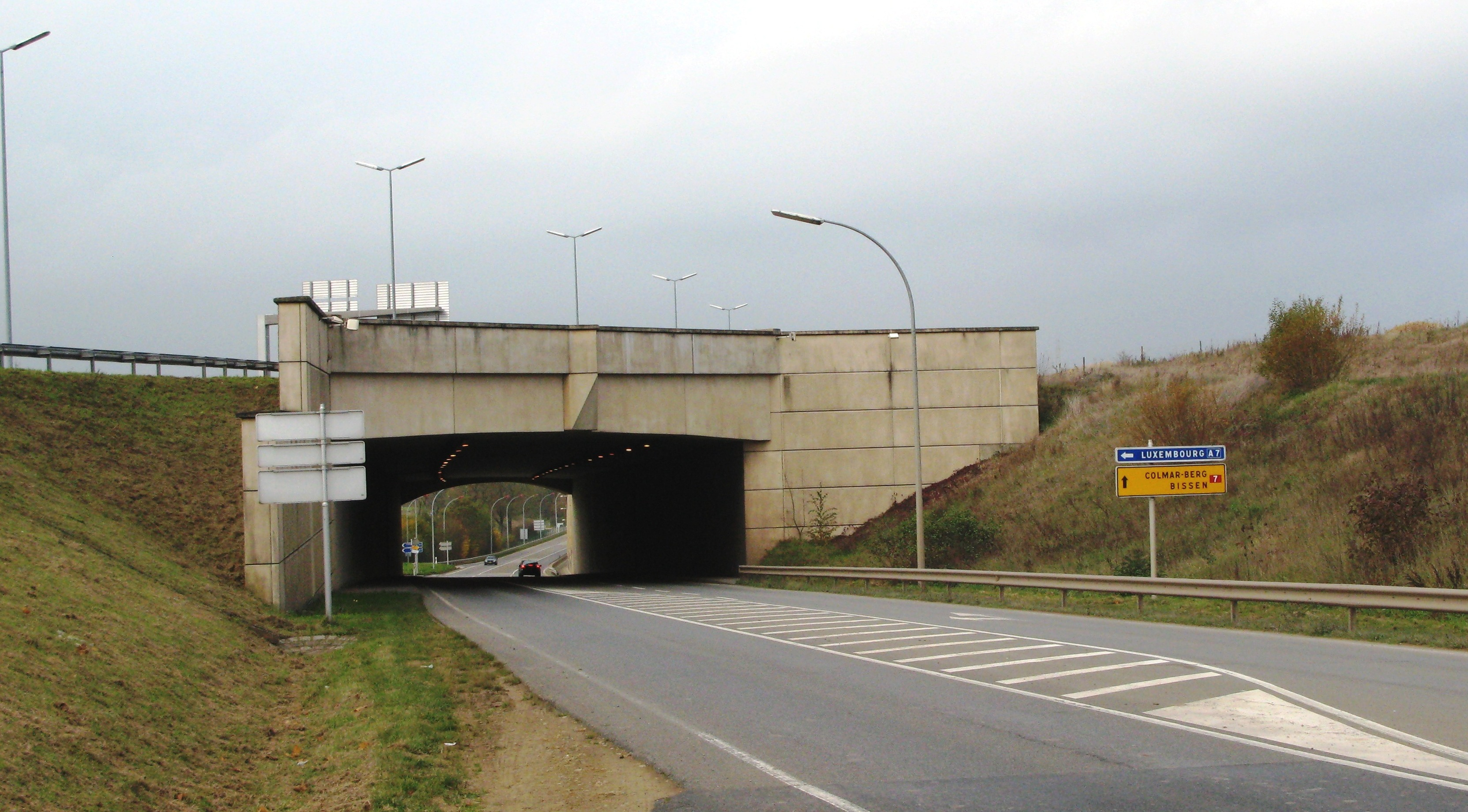 Bréck vun der A7 iwwer d'N 7 um Mierscherbierg N7 A7